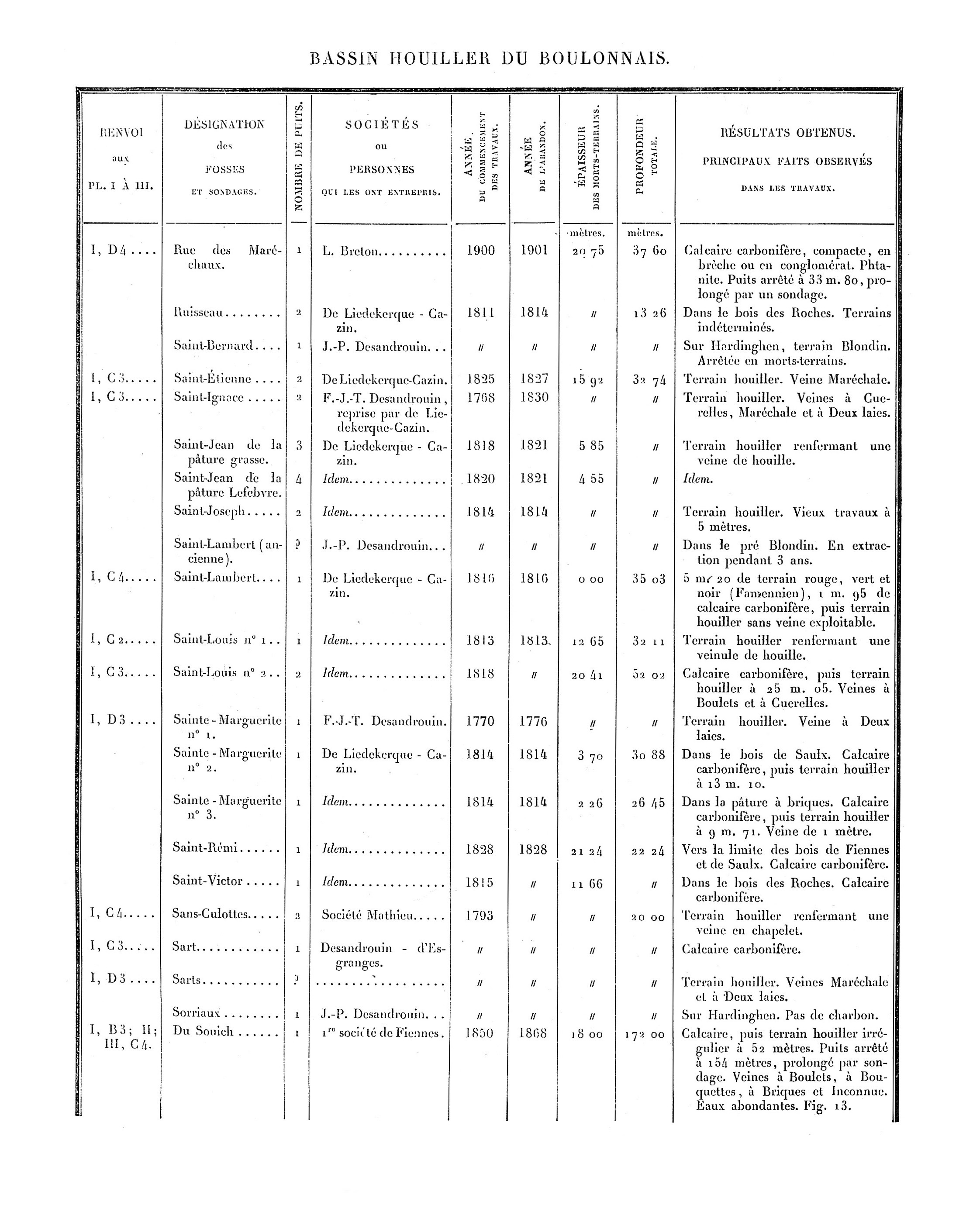 Liste des puits de mine et des sondages. Mines du Boulonnais. Document extrait de Étude des Gîtes Minéraux de la France. Topographie Souterraine du Bassin Houiller du Boulonnais ou Bassin d'Hardinghen, par A. Olry, ingénieur en chef des Mines. Chapitre IX, pages 172 à 189.